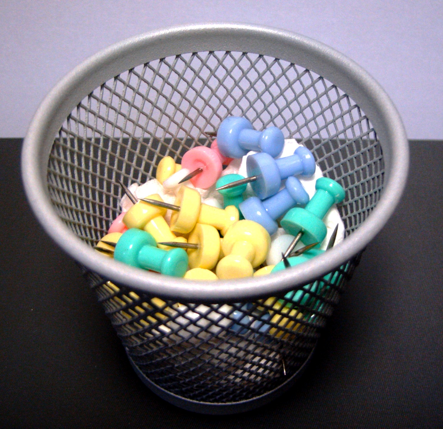 圖釘